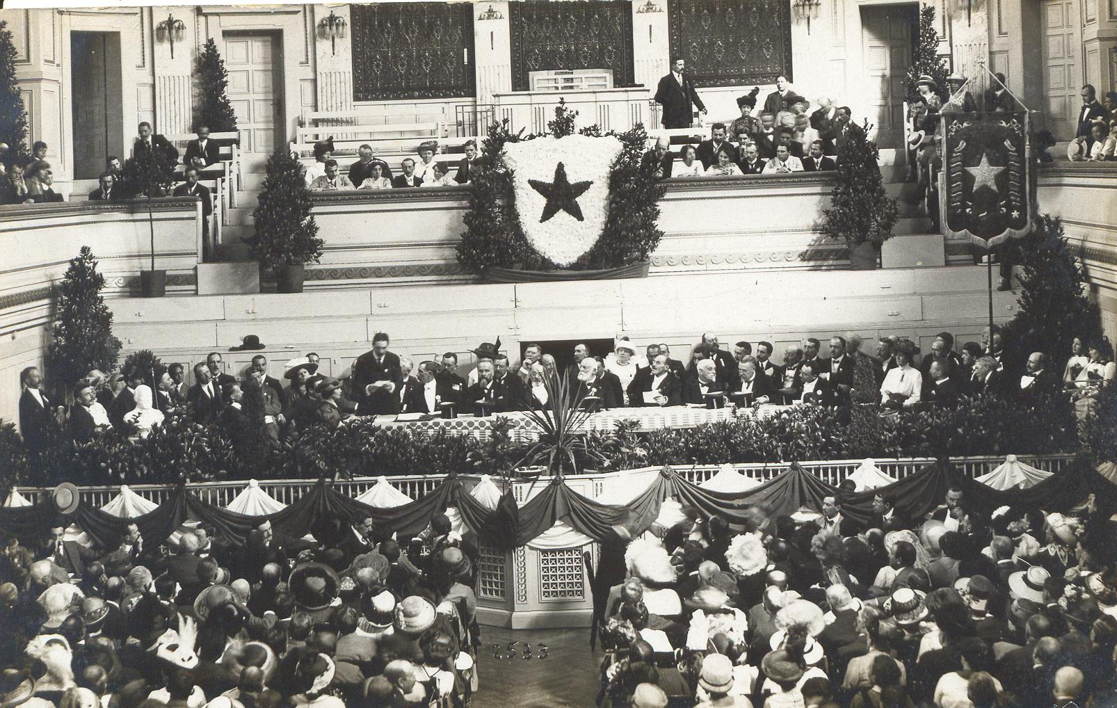 9a UK, Berno, 1913. Podio dum la solena malfermo.